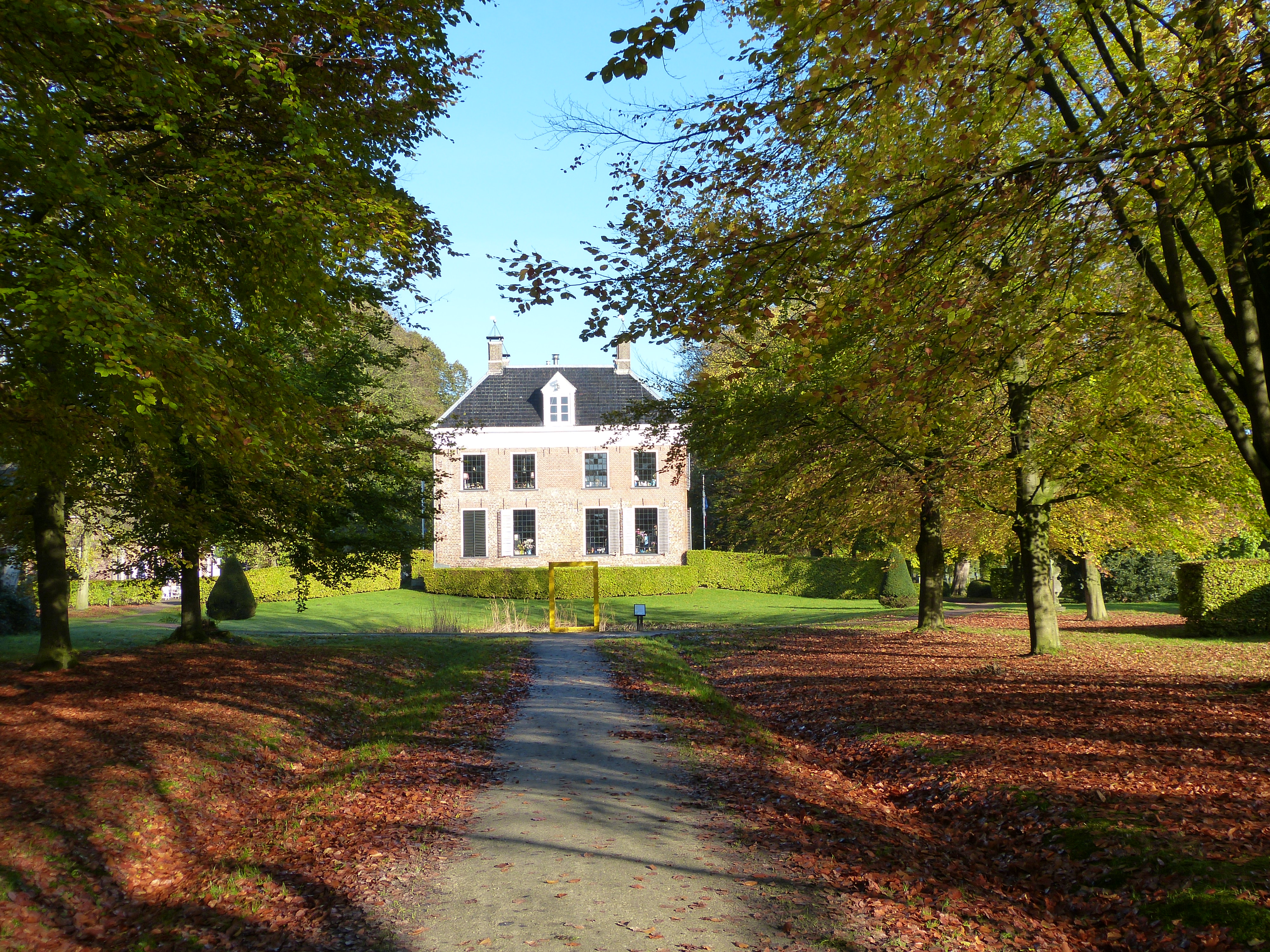 Midwolda Ennemaborg Parkaanleg